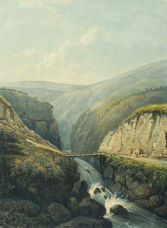 Litho. Litho naar een oorspronkelijk schilderij van A. Salm.. De rivier Brandas